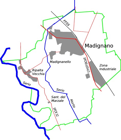 Mappa schematica del territorio di Madignano